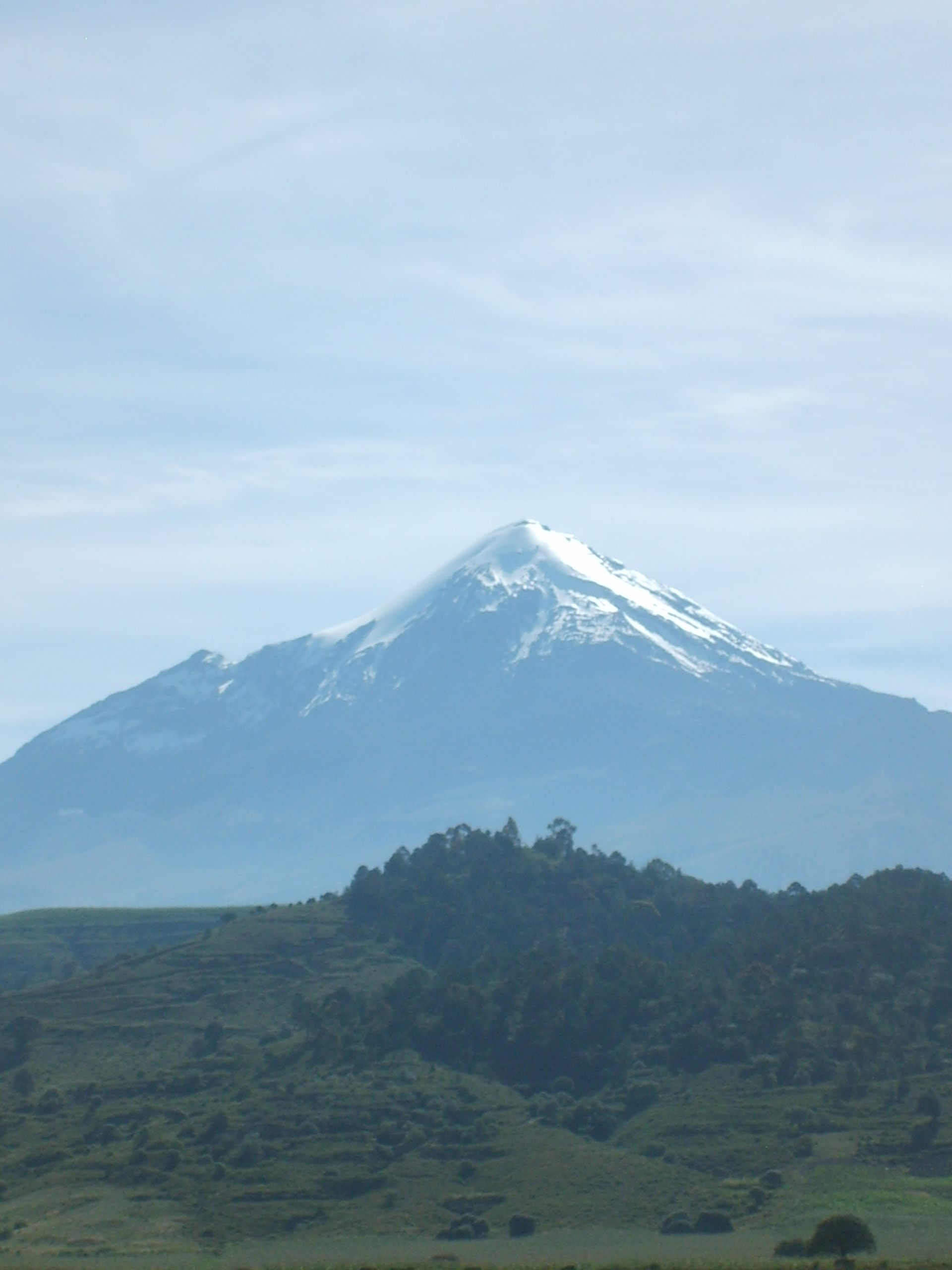 El Pico de Orizaba desde la carretera Puebla-San Andrés, México